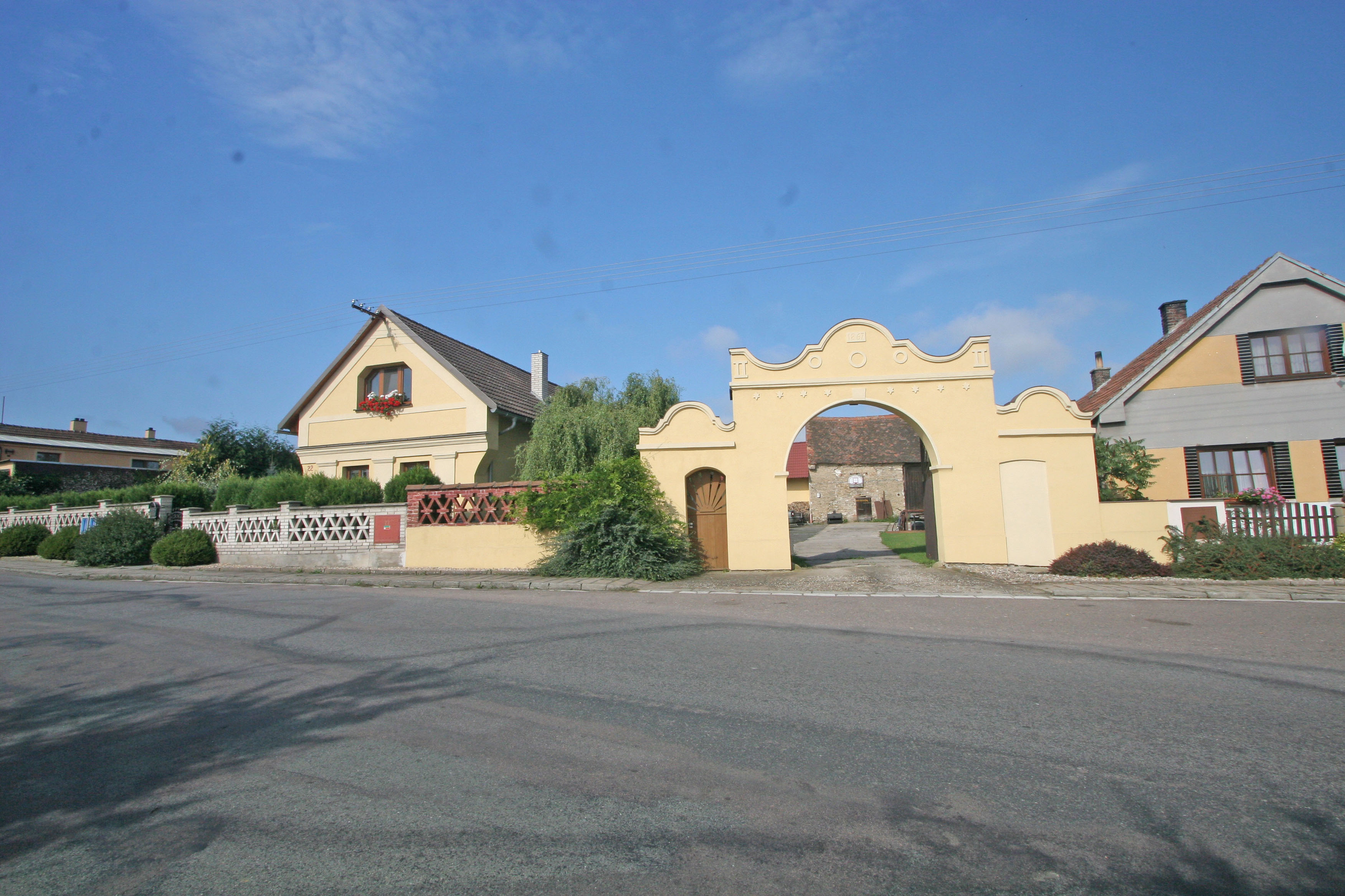 Jankovice čp 22